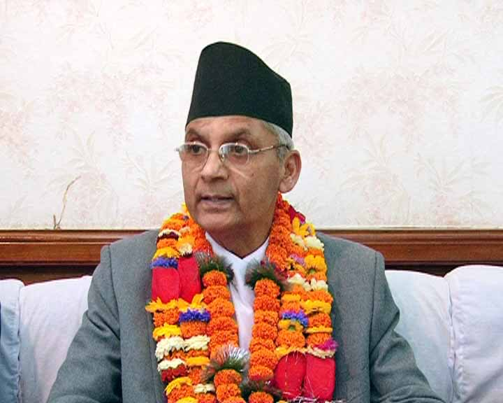 नेपाली: प्रधान न्यायाधिश भएपछि खिलराज